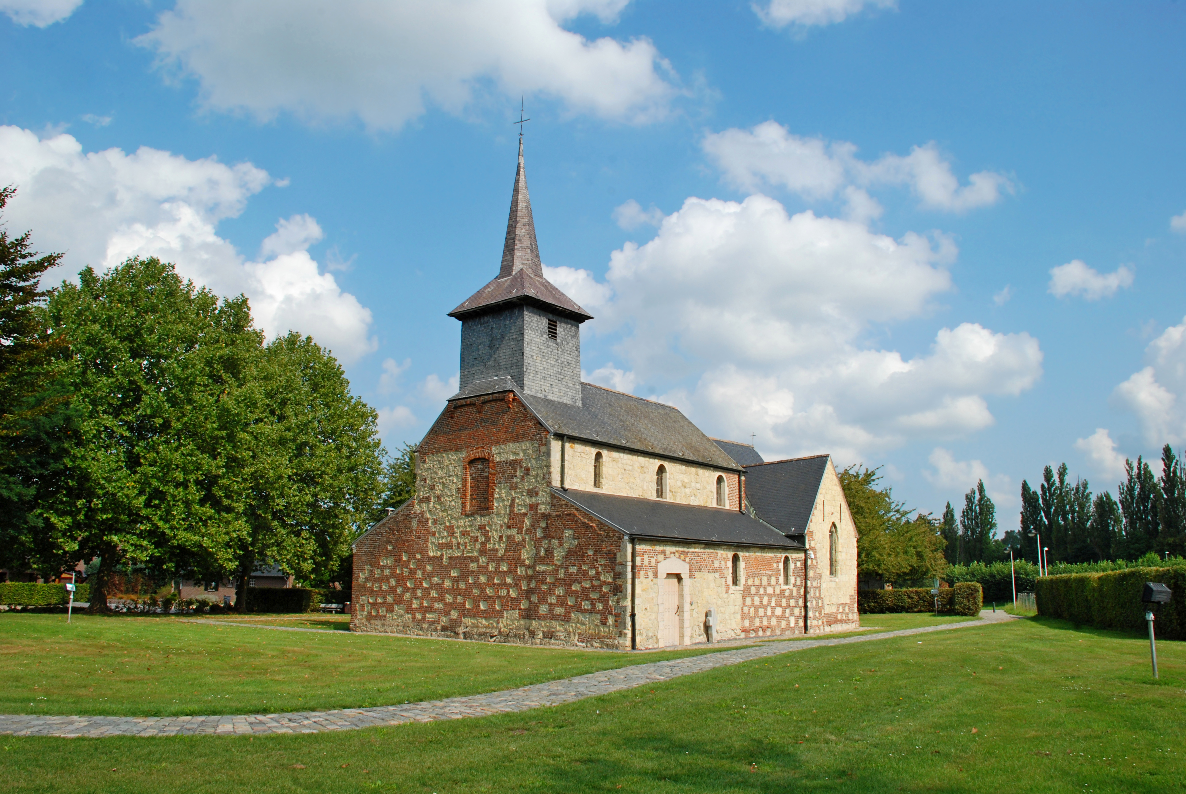 Belgique - province du Limbourg - Saint-Trond - Guvelingen - Église Sainte-Croix This photo of immovable heritage has been taken in the Flemish Region